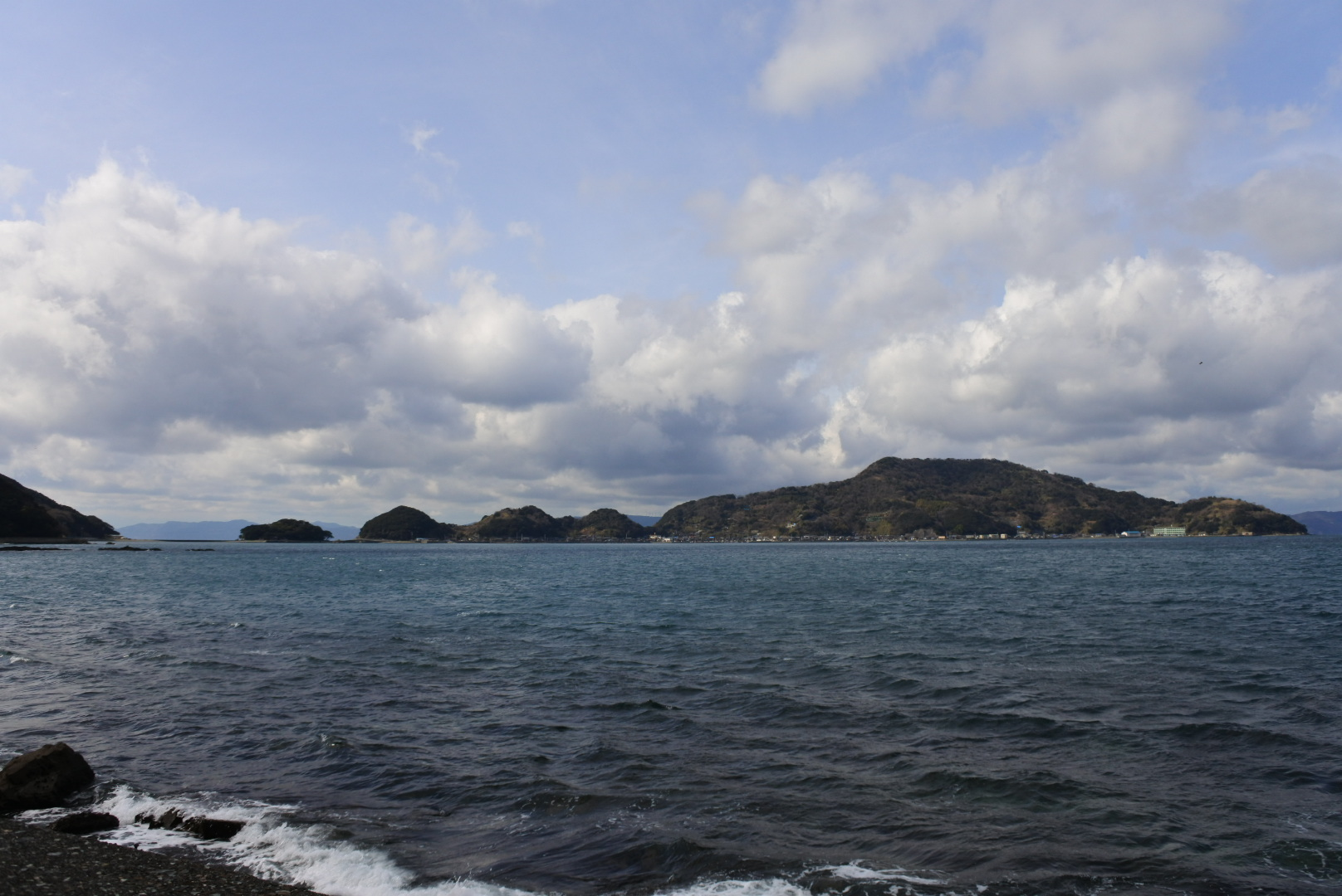 地大島の北岸から西に大島方面を望む。右から順に大島・三王島・地大島が連なって見える。